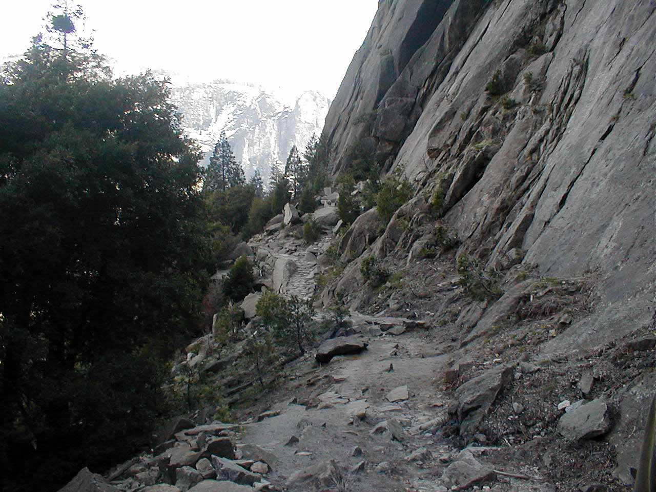 Стежка до водоспадів Йосеміті